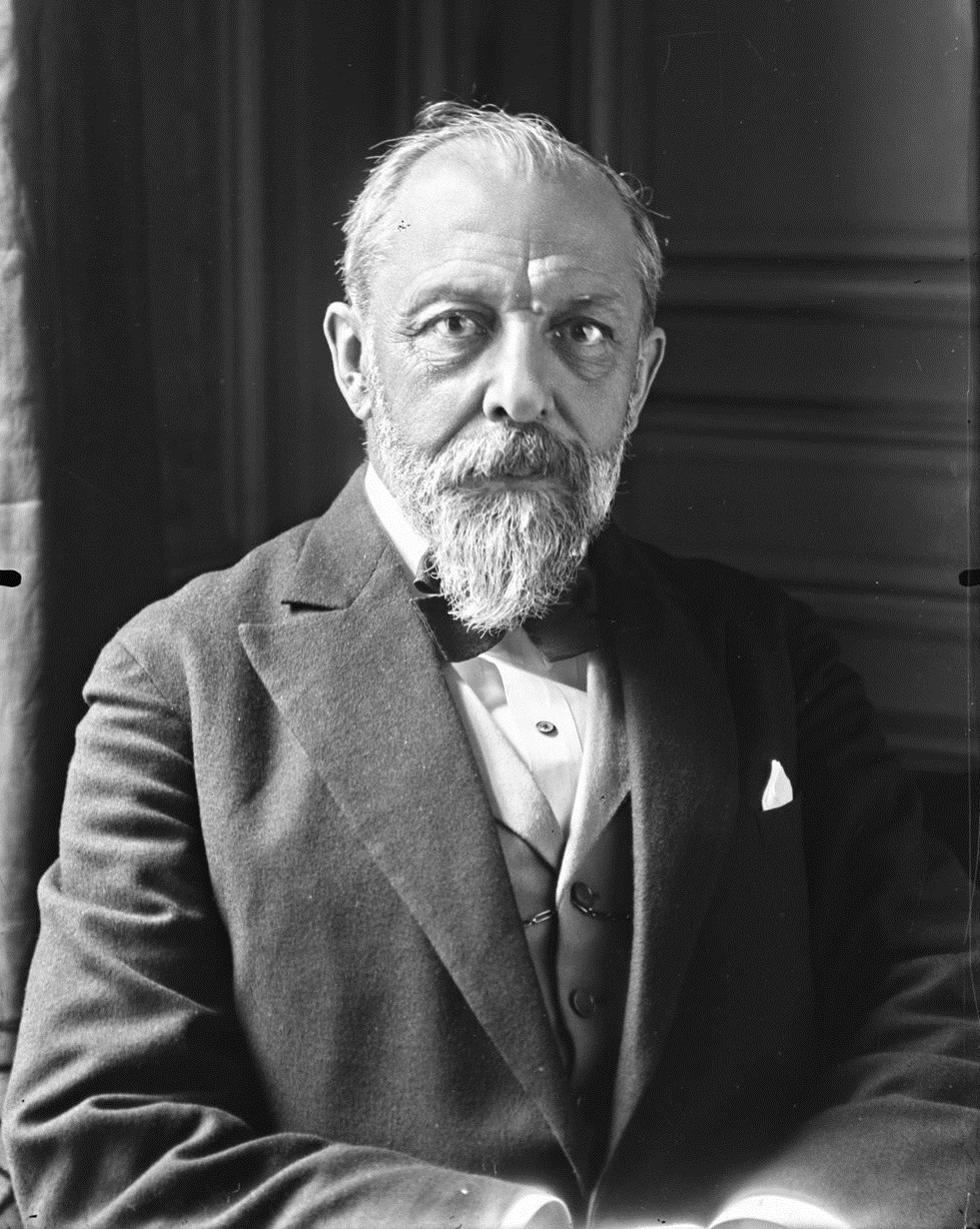 Théodore Steeg en 1926.